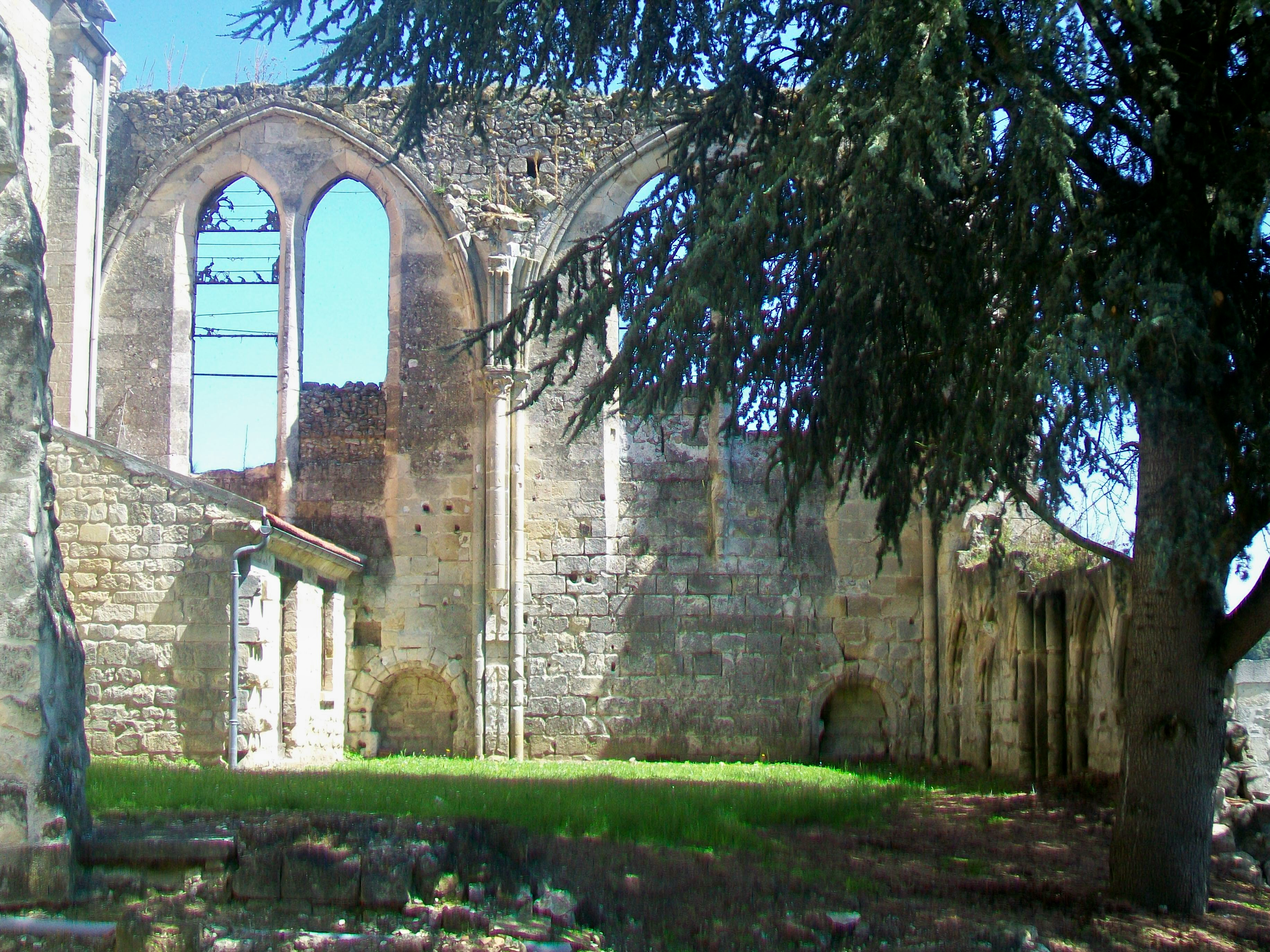 Vue du mur clôturant la grande chapelle à l'est, depuis l'intérieur. La sacristie à gauche est postérieure à 1912.